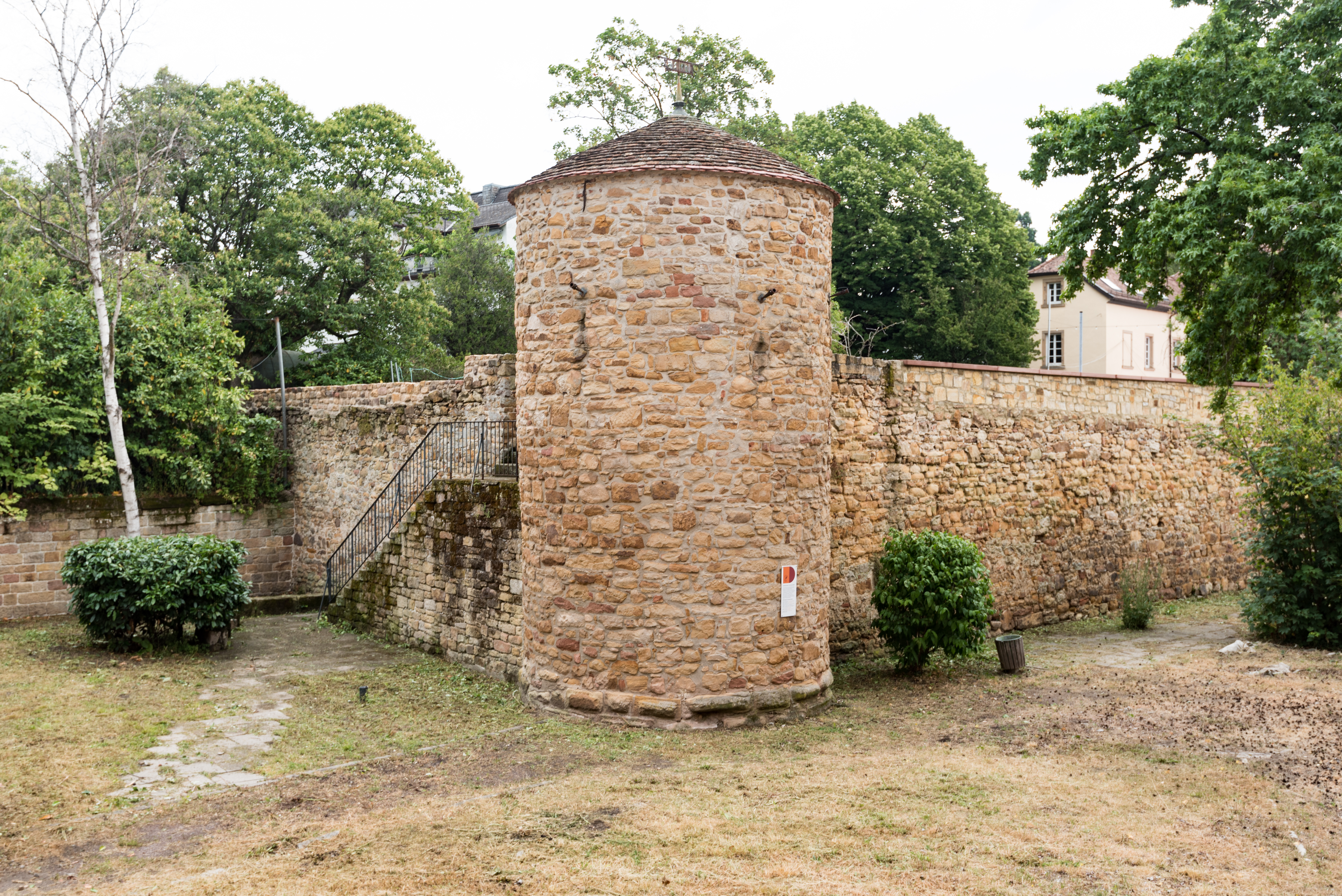 Deidesheim, Stadtgraben